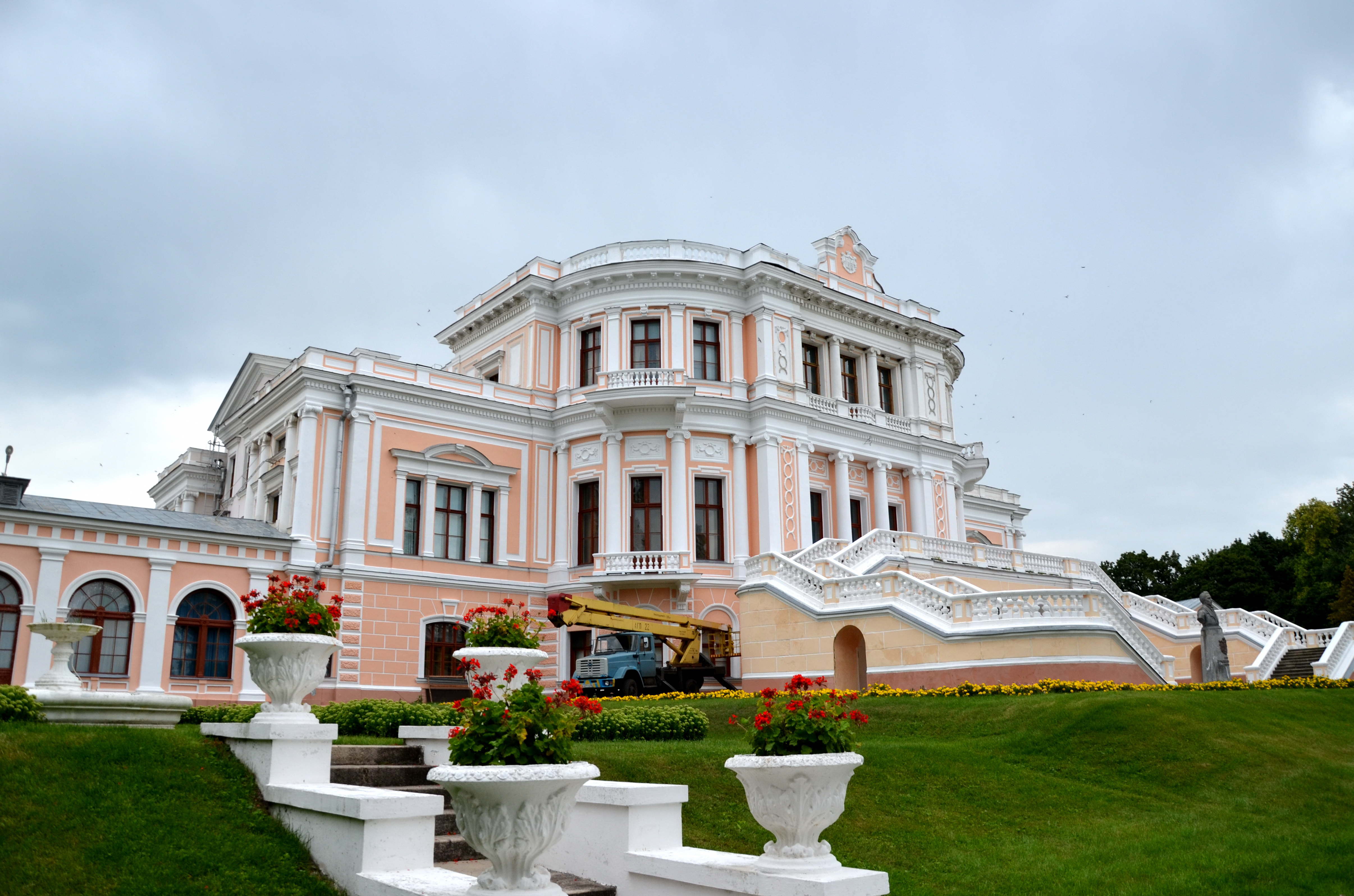 Марьино (усадьба Барятинских)